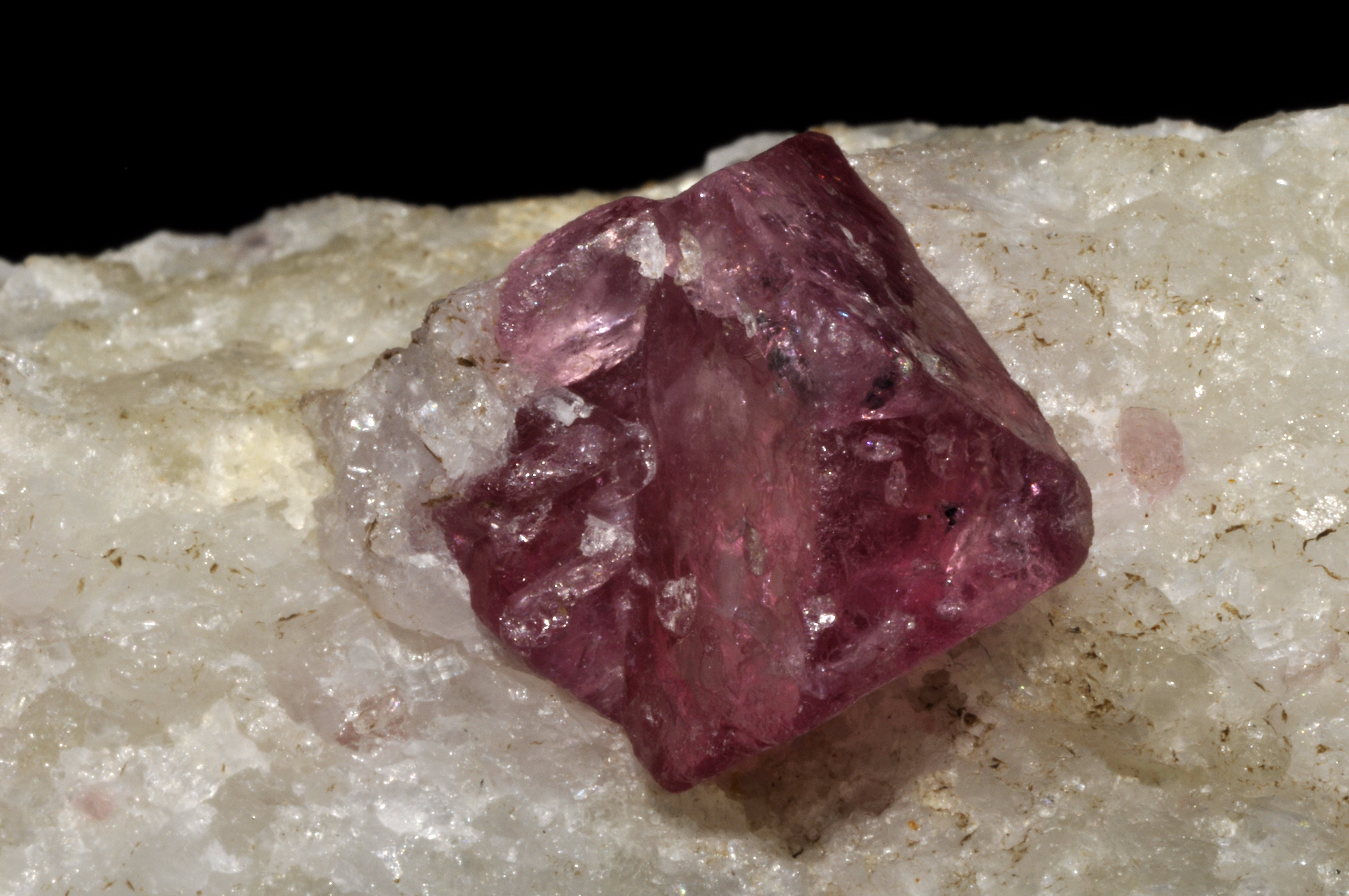 Cristal de Spinelle rouge sur gangue de Calcite